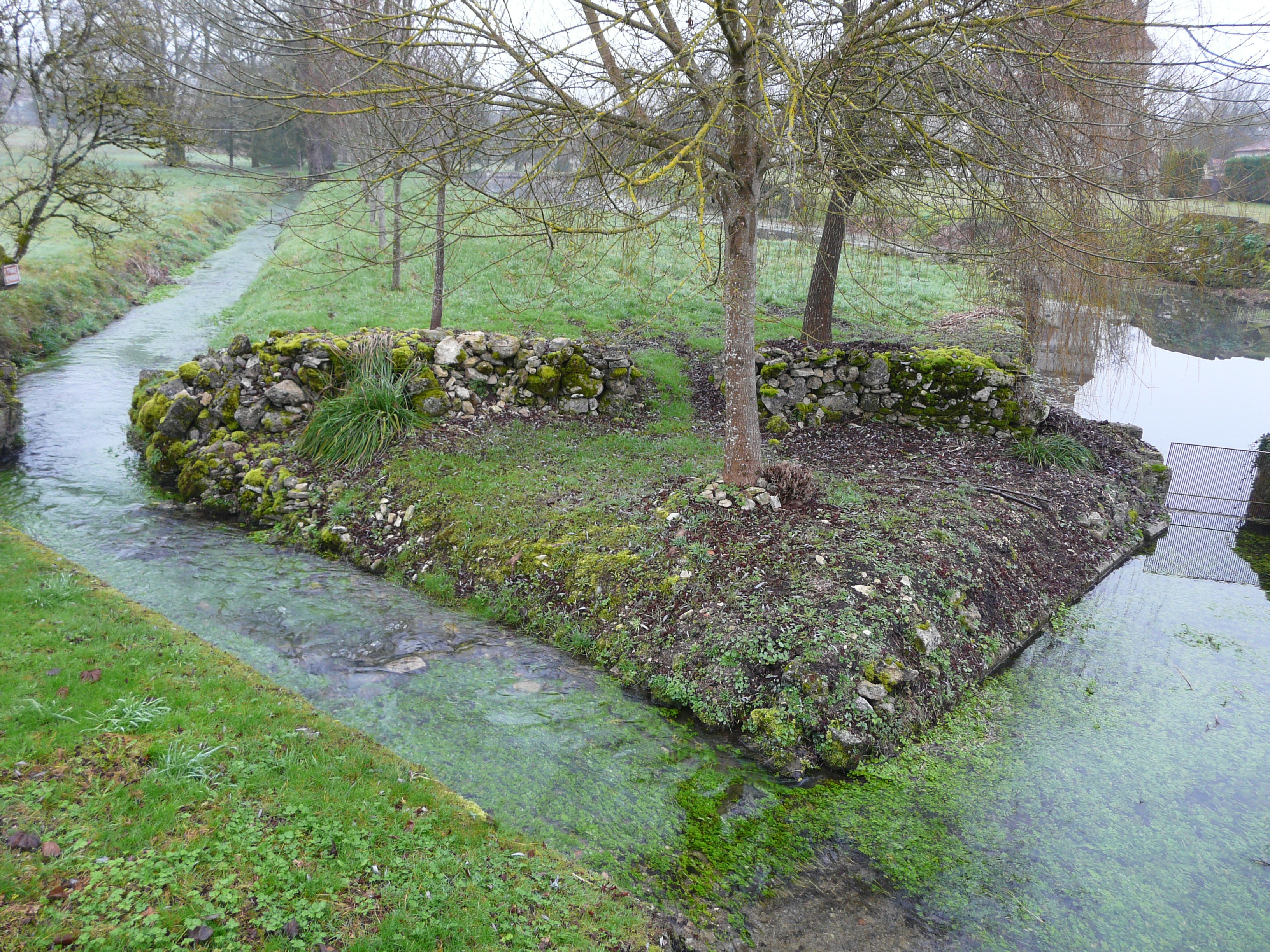 L'Euche en aval de la route de Cercles, Chapdeuil, Dordogne, France. La branche de droite alimente en eau les douves du château de Chapdeuil.